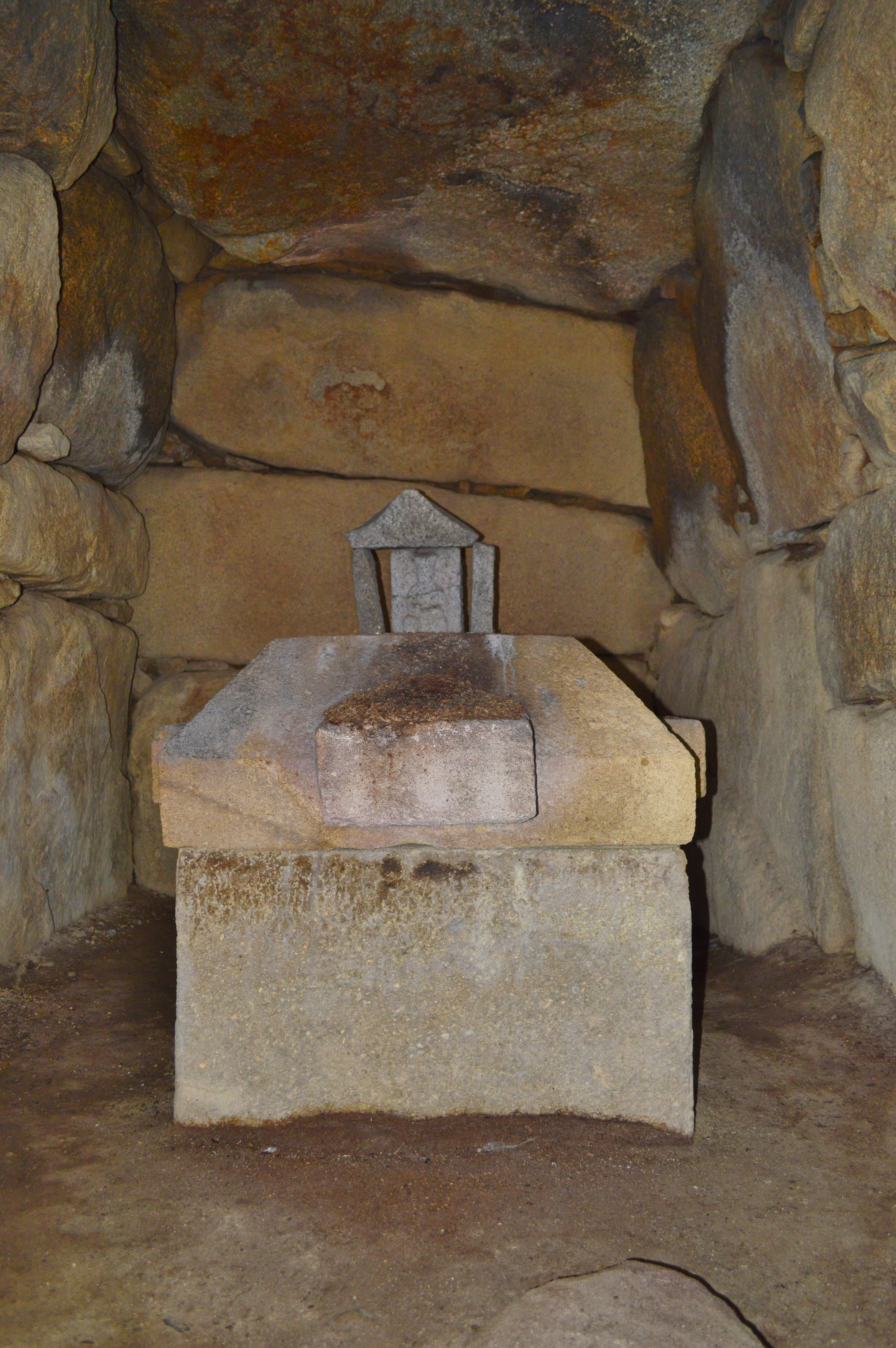 大日古墳 石室玄室